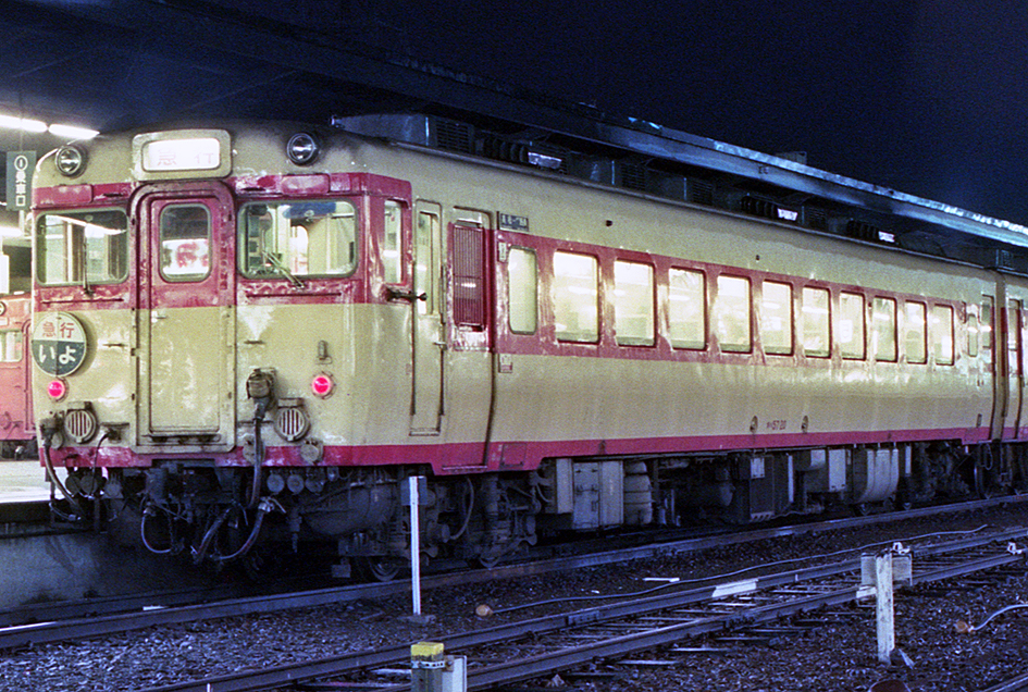 国鉄キハ57系気動車 キハ57 20 「いよ」